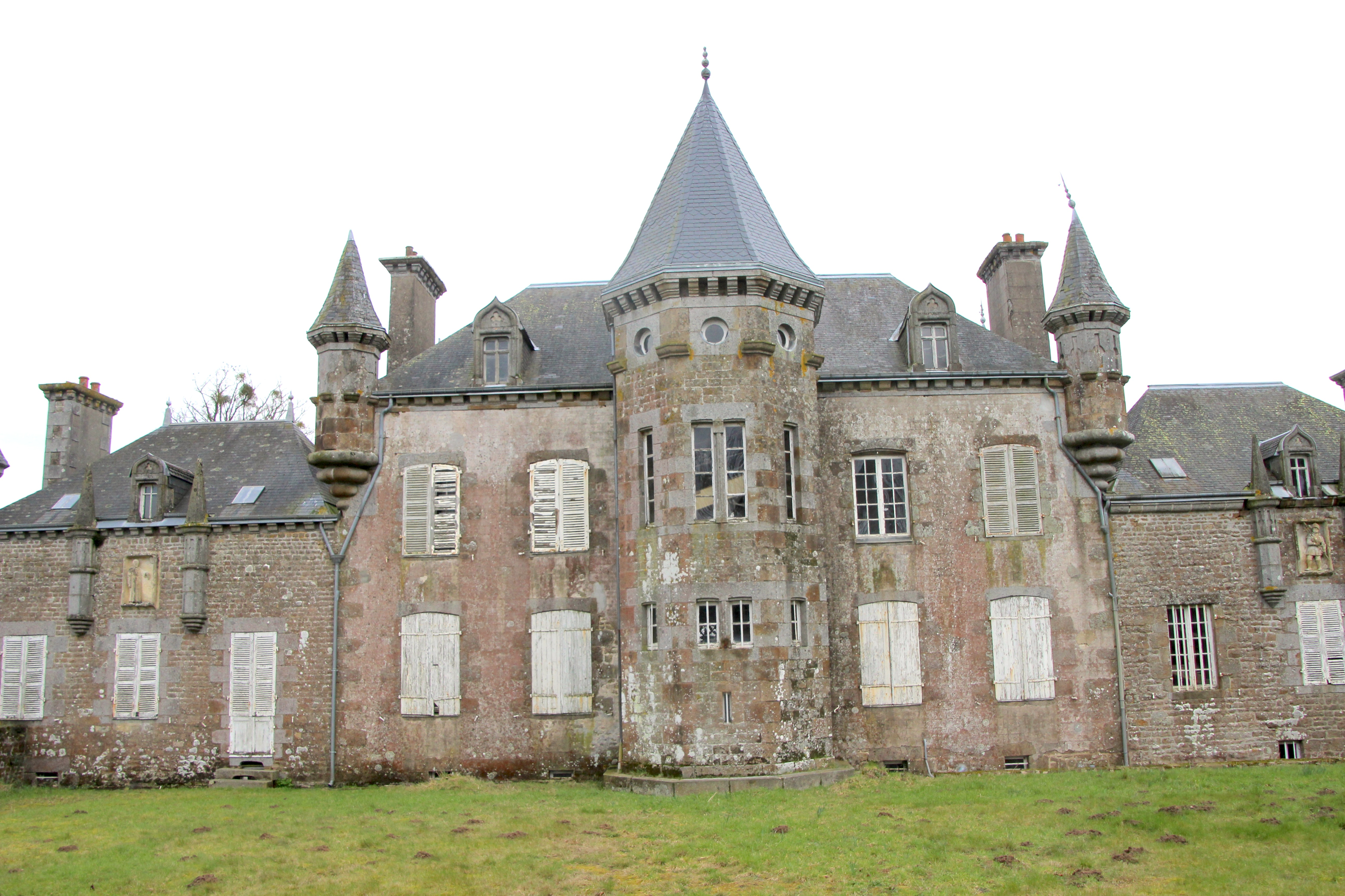 chateau de Beauvain